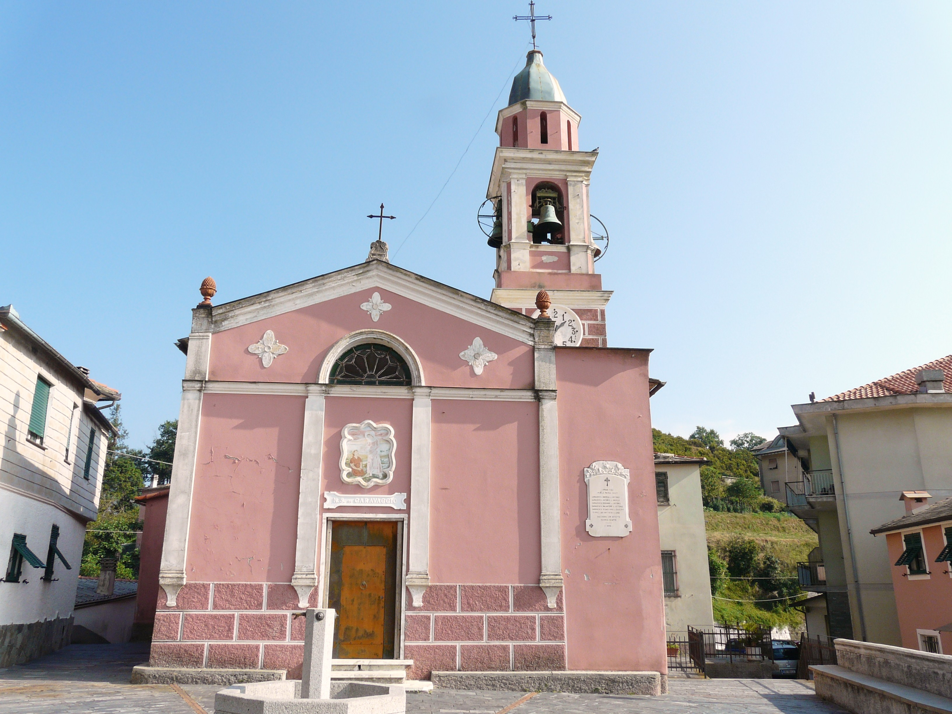 Campanile della Chiesa di Nostra Signora di Caravaggio, Calcinara, Uscio, Liguria, Italia